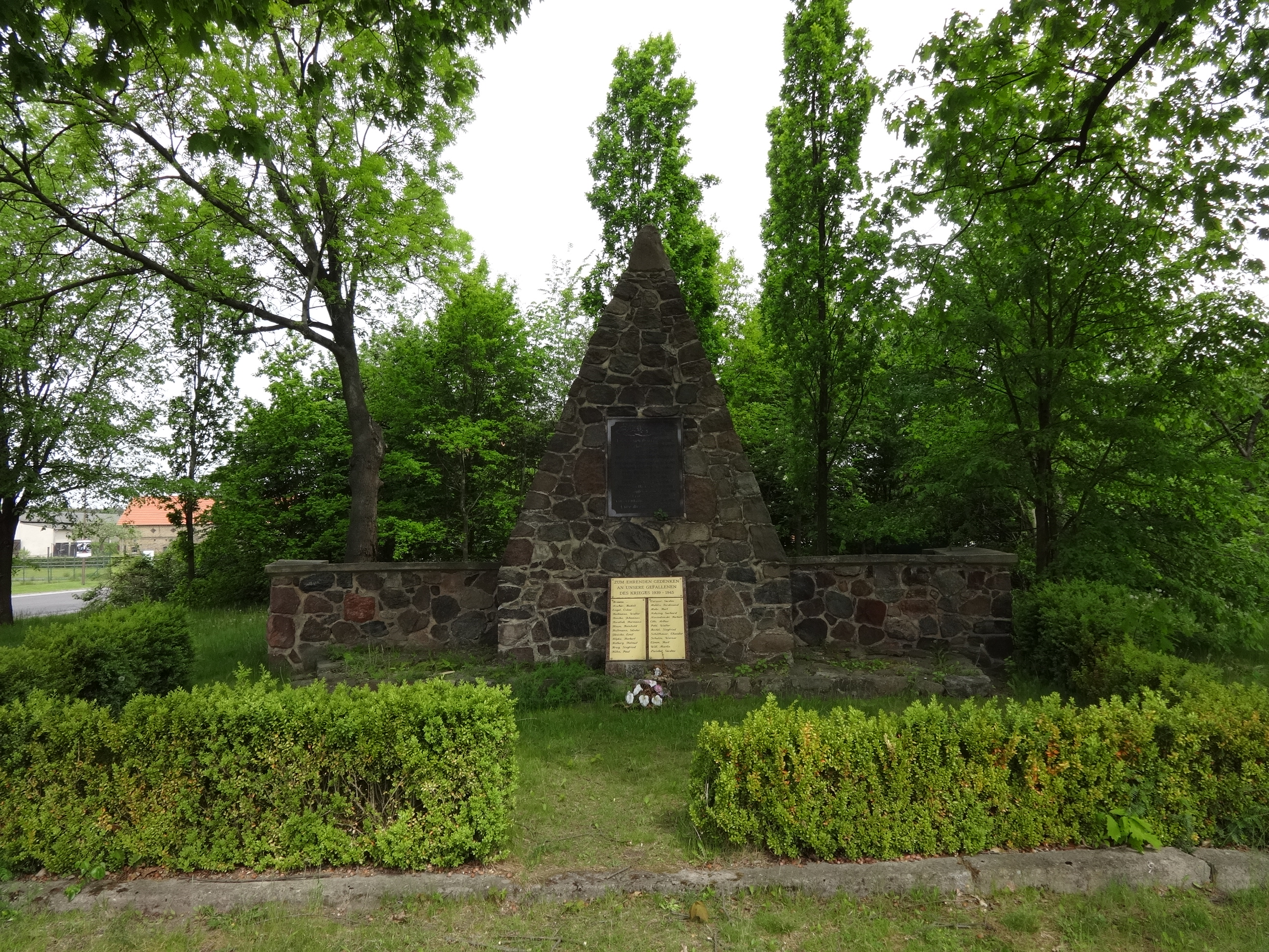 Denkmal für die Gefallenen des ersten und zweiten Weltkrieges am Dorfanger in Thyrow, Trebbin, Teltow-Fläming (Brandenburg)